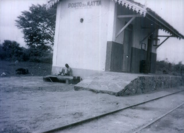 Estação que deu origem ao nome e a cidade.